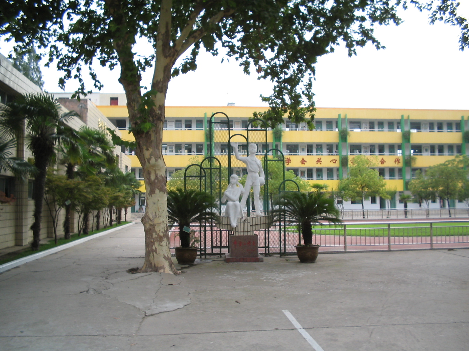 南京市长江路小学，2005年7月20日在南京拍摄。